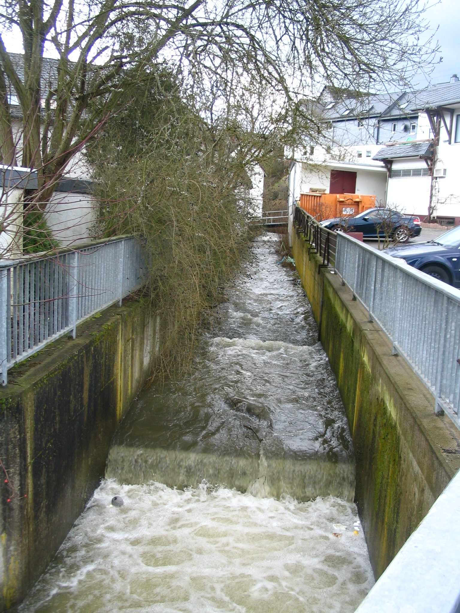 In die Betonrinne gefasster Rhaunelbach in Rhaunen